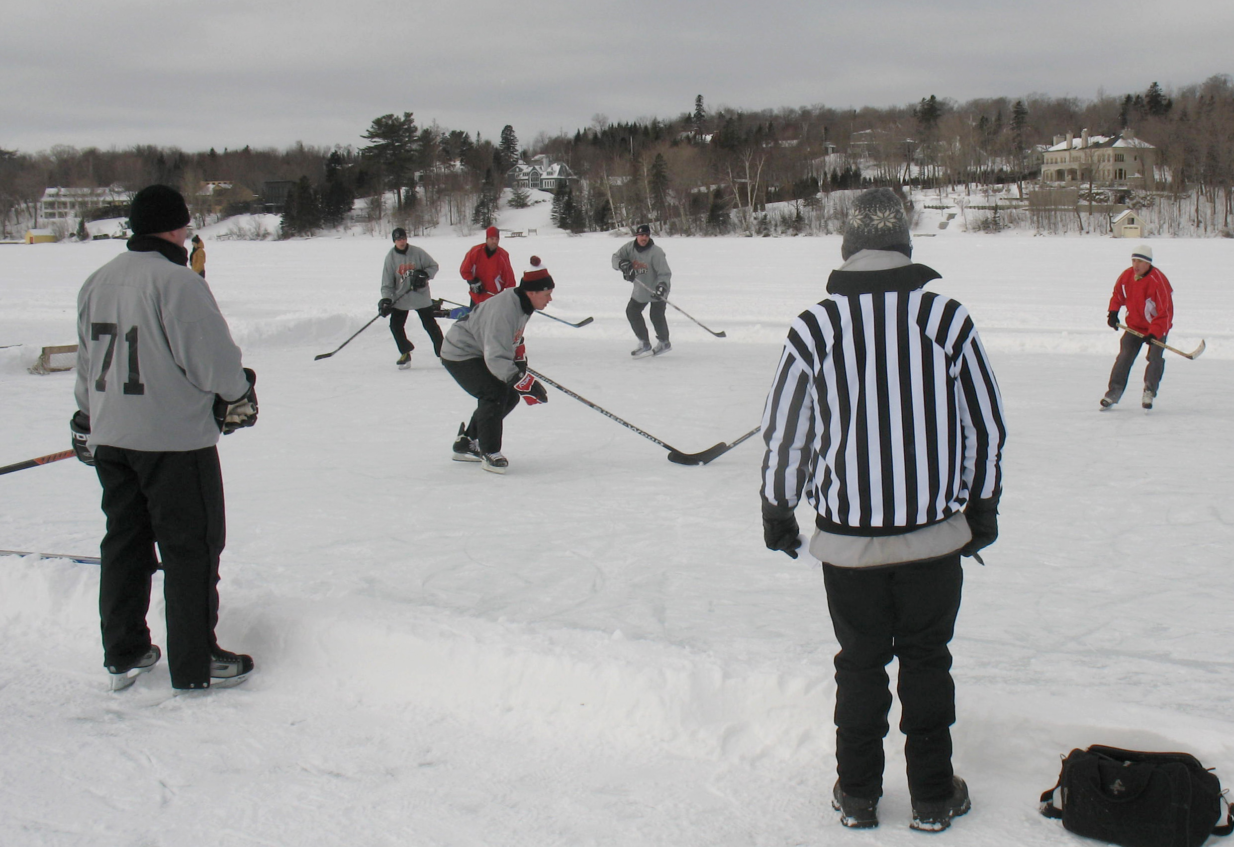 Pond Hockey Lac-Beauport, 6 février 2010. Capitale-Nationale, Province de Québec, Canada. Tournoi de hockey d'antan sur le lac Beauport comprenant 25 patinoires et 96 équipes.